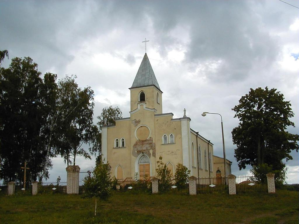 Demenes katoļu baznīca 2001-08-11